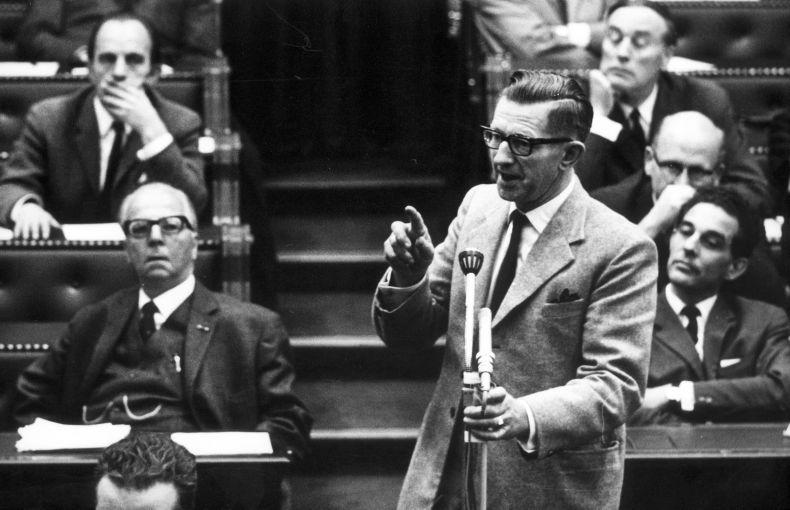 Hendrik Koekoek [1912 - 1987] voorzitter van de door hemzelf opgerichte Boerenpartij tijdens behandeling begroting 1967 in de Tweede Kamer op 12 oktober 1966 waar hij de grote partijen beschuldigt van het hebben van ex-NSB'ers onder de leden.